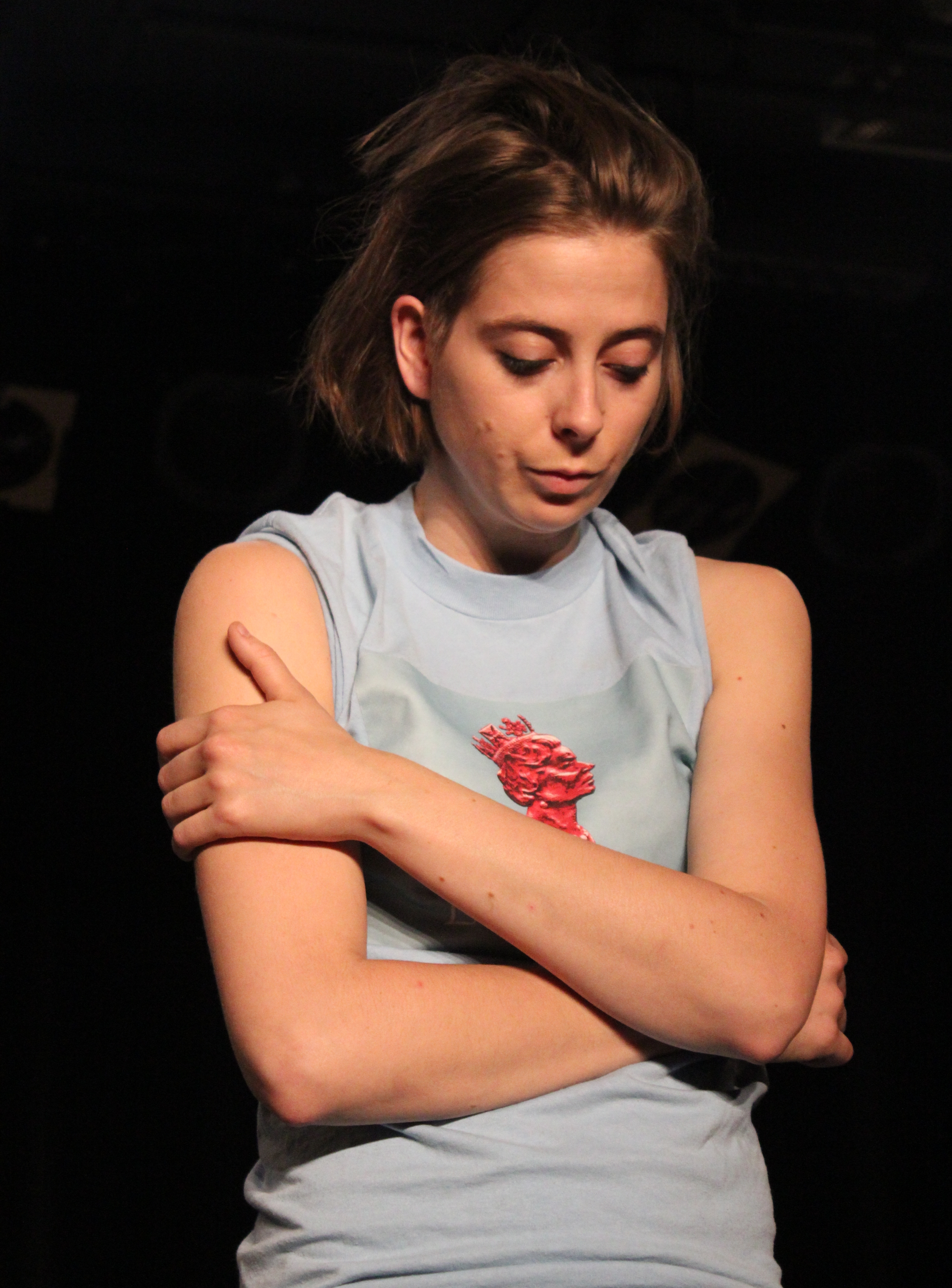 Ève Landry - Ligue d'improvisation estivale (LIE) - Rivière-du-Loup, Québec. Match spécial 10 juin 2013.